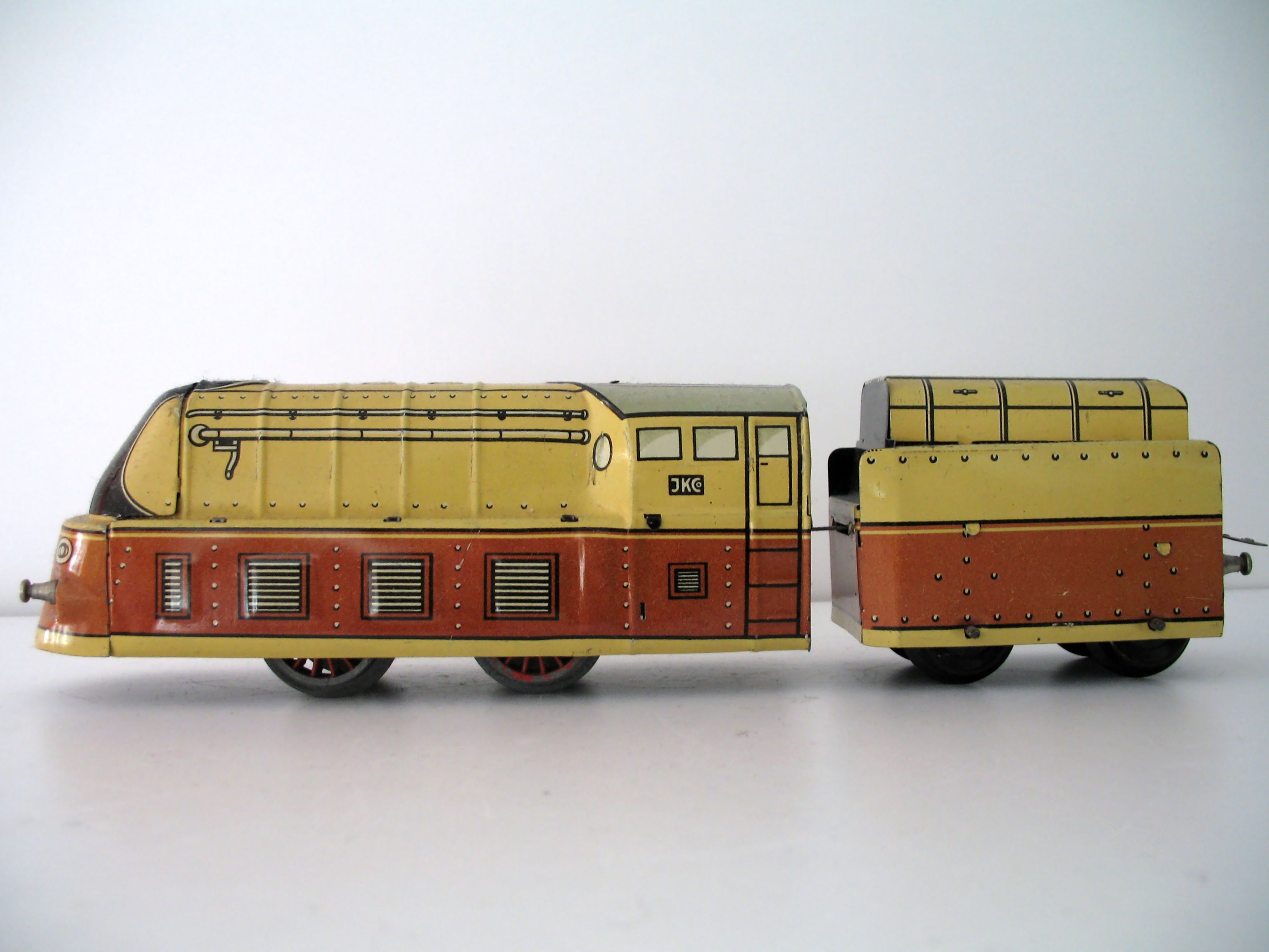 Stromlinienlok der Fa. Kraus Fandor ca. 1936